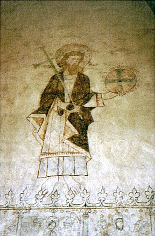 Ekeby kyrka, Gotland i Gotland, Sverige. Skib nordvæg, Filip